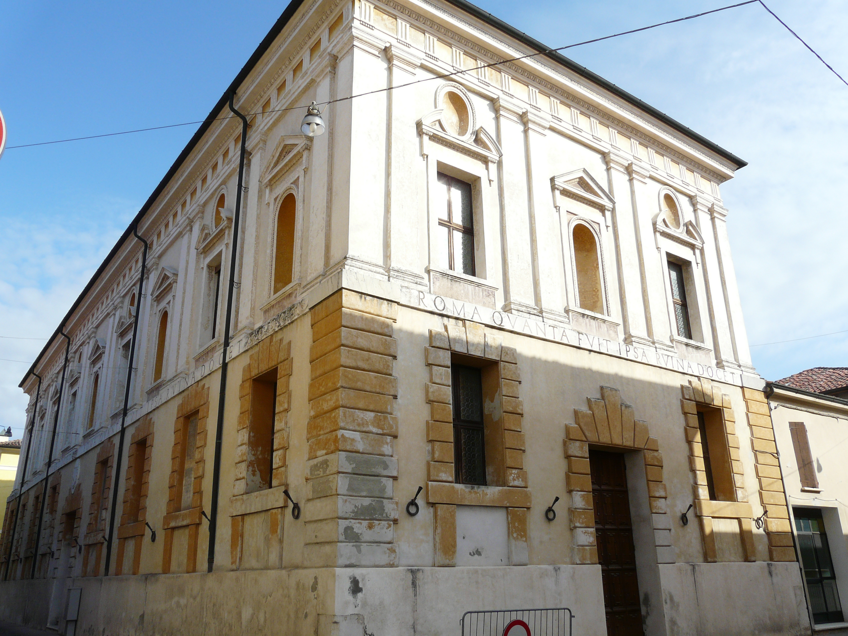 Teatro di Sabbioneta, Lombardia, Italia